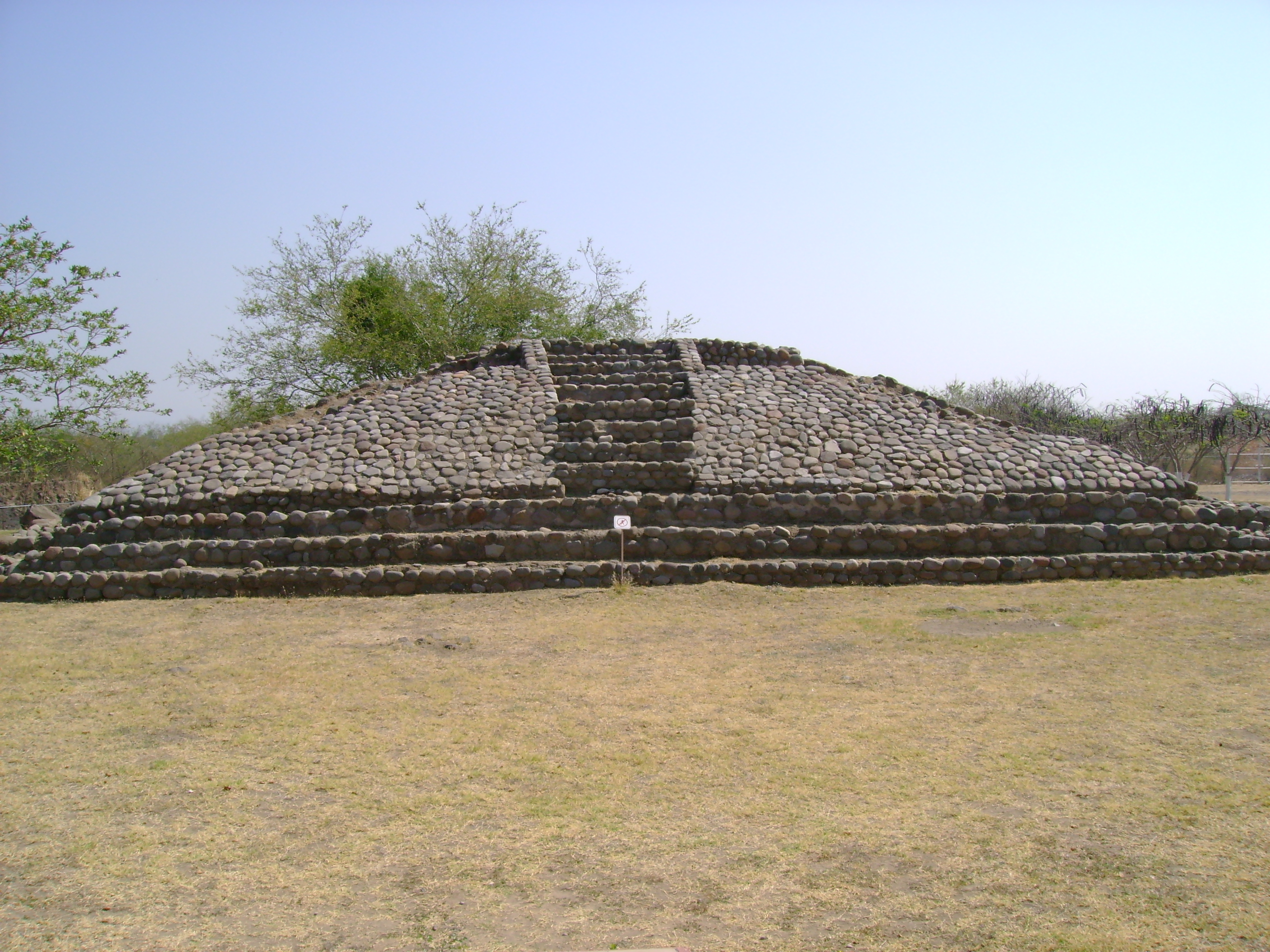 Zona Arqueológica de La Campana en Colima, México.